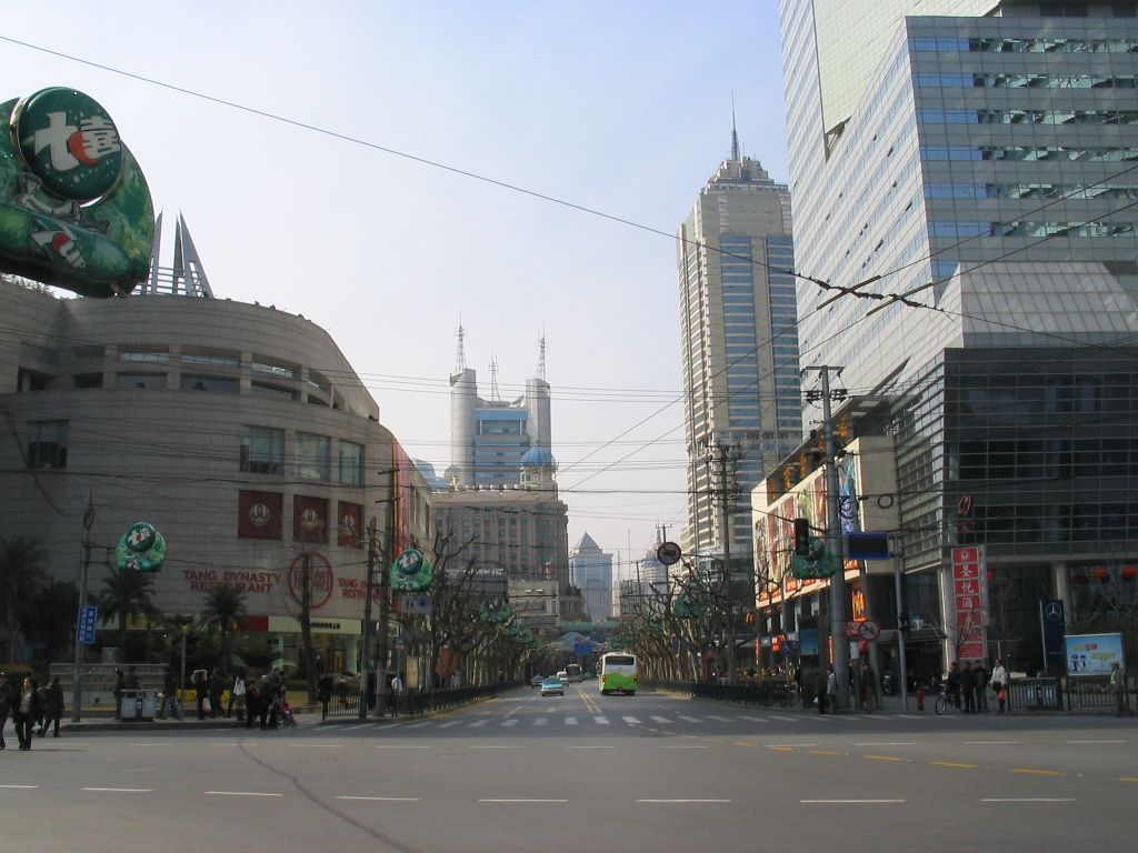 南京西路-黃陂北路-成都北路方向 West Nanjing Road